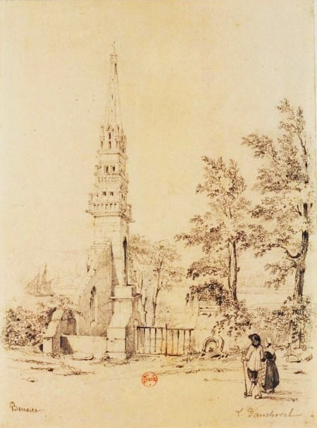 Beuzit-Saint-Conogan : l'église en ruines vers 1880 (Léon Gaucherel)